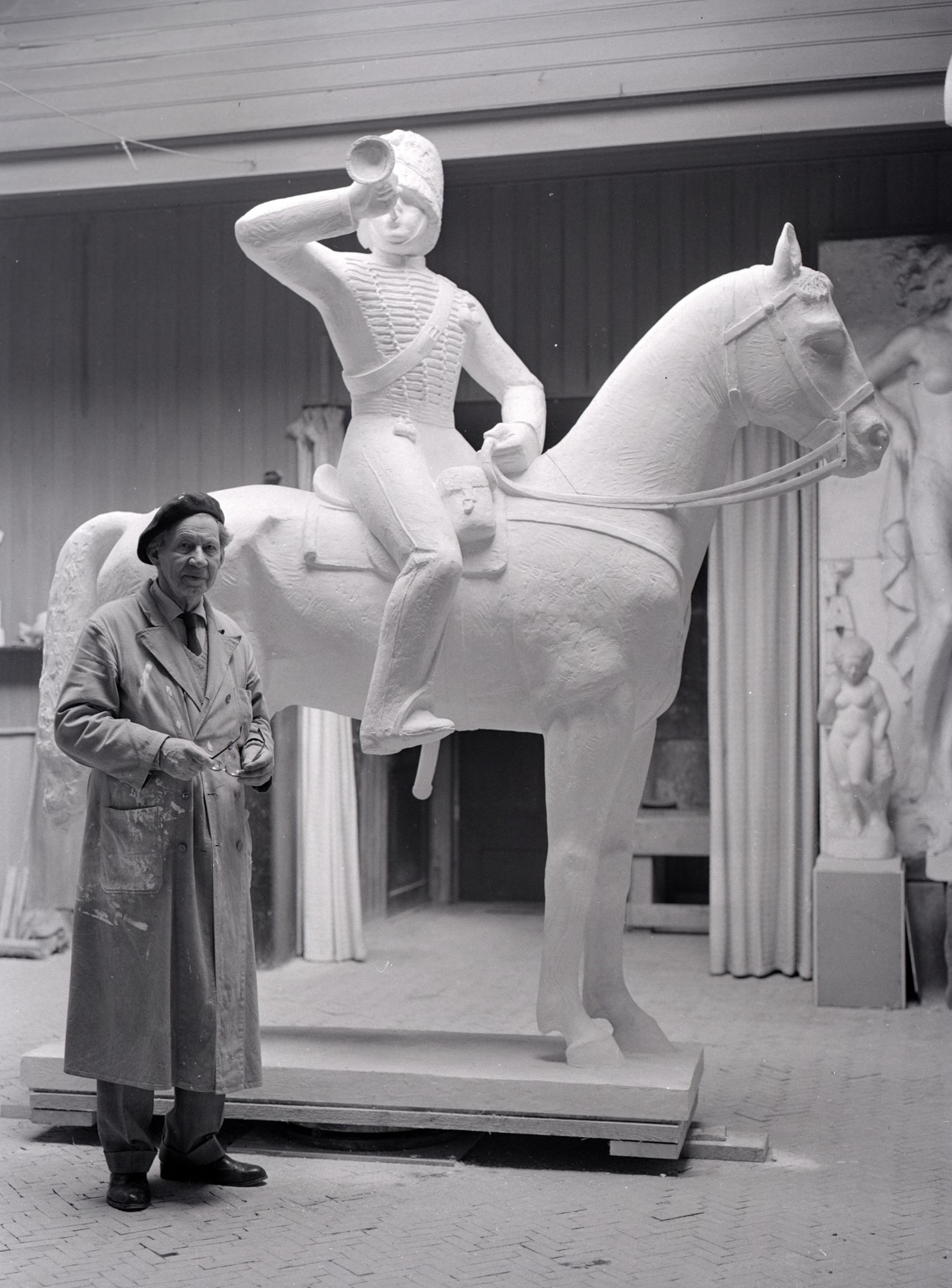 Gijs Jacobs van den Hof met zijn beeld De Gele Rijder